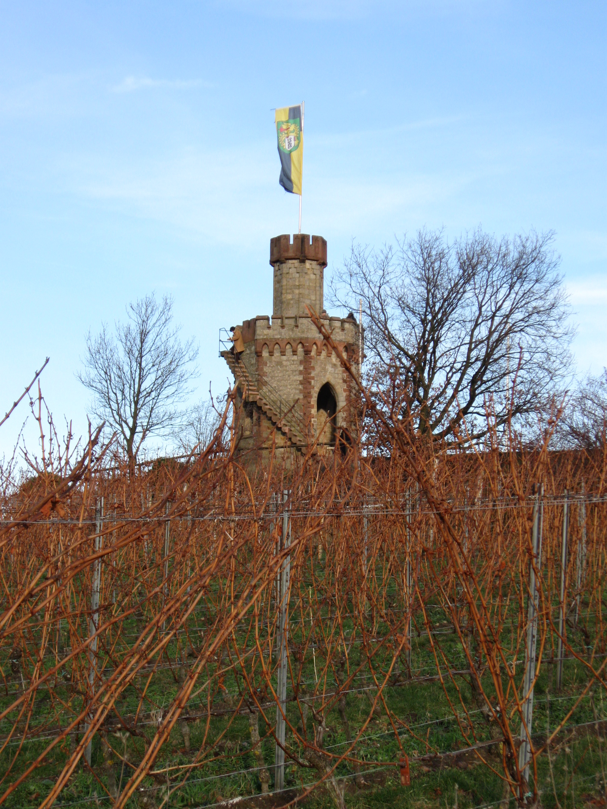 Flaggenturm zwischen Wachenheim und Bad Dürkheim